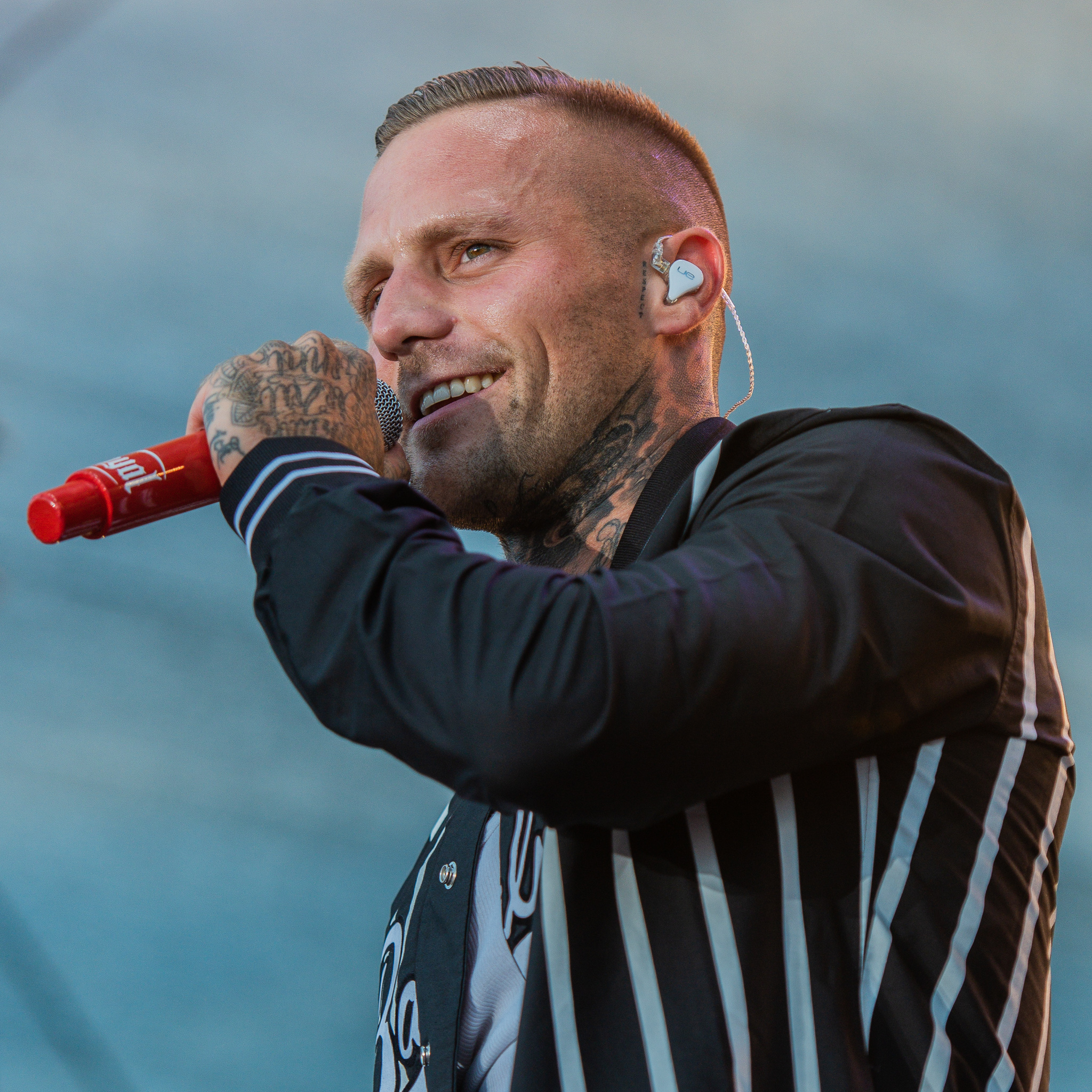 Concertbüro Franken,Gute Nacht Live 2018,Kontra K,Konzert,Livekonzert,Livemusik,Maximilian Diehn,Musik,Open Air am Airport